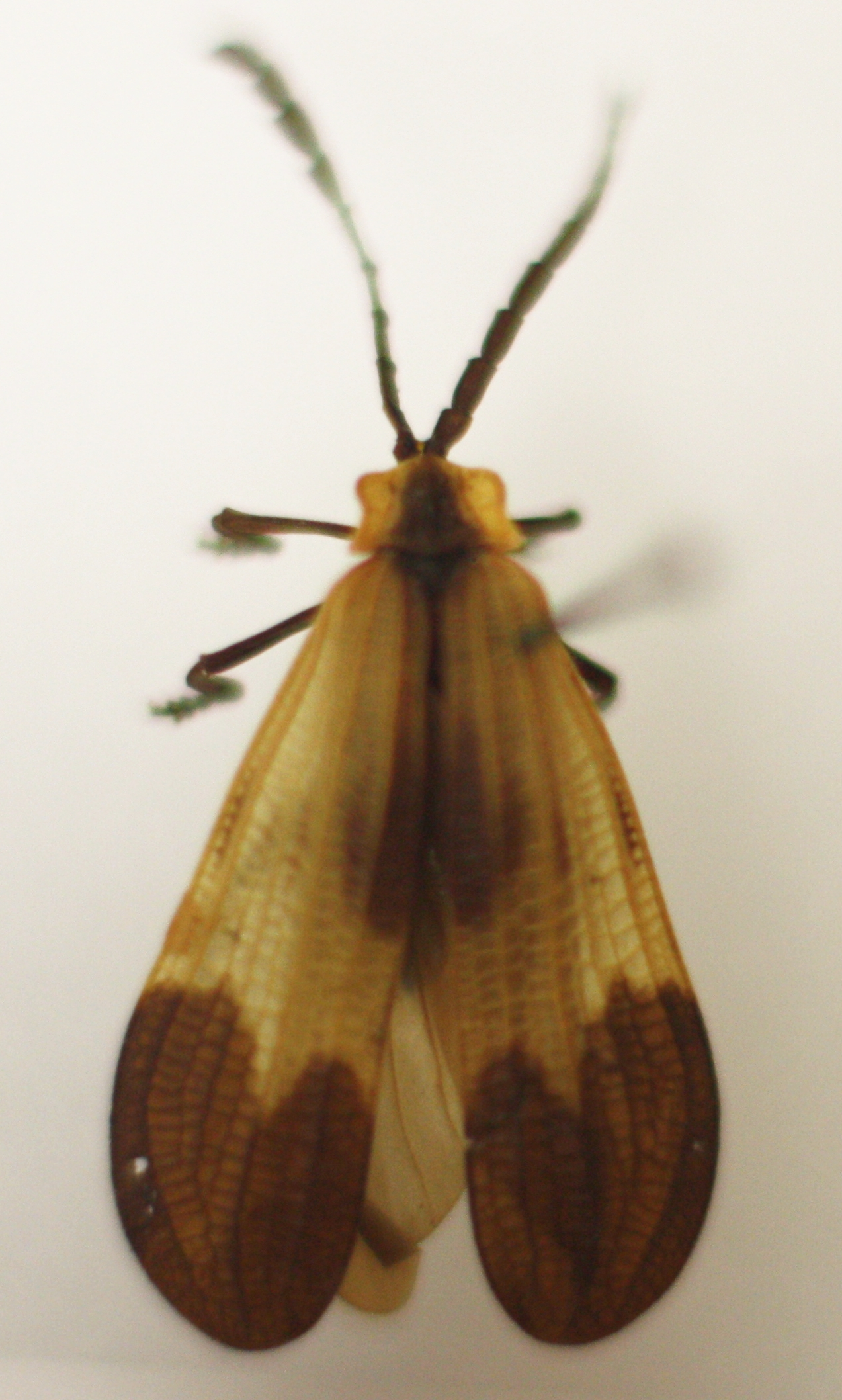 Naturkundliche Sammlung Übermaxx Überseenuseum Bremen; Schmetterlinge und andere Calopteron brasiliense Castelnau, 1840 Lycinae Lycidae